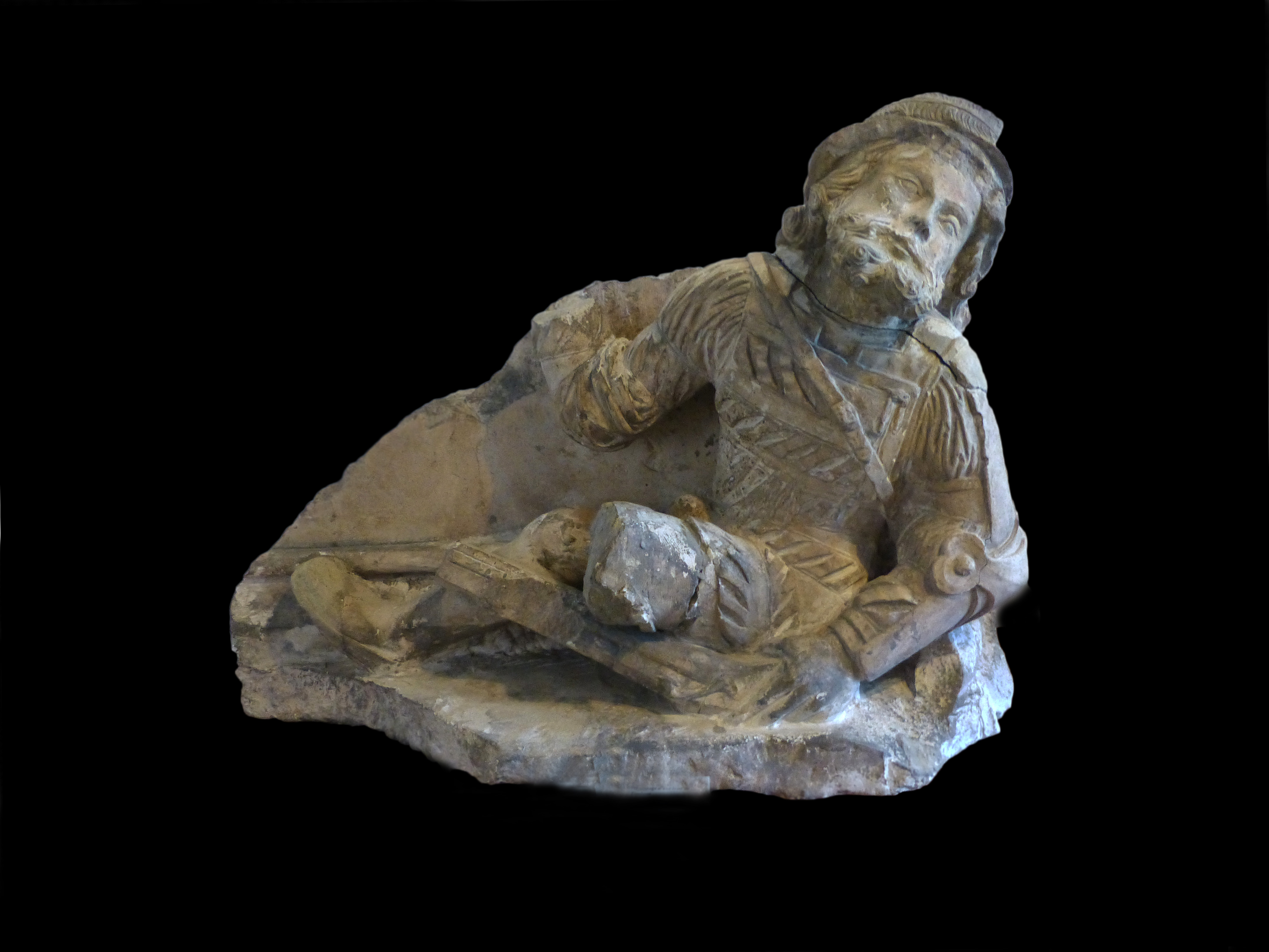 Gardien du tombeau, par le maître I. W. (Jacquemin Wiriot), vers 1525. Calcaire fin, traces de polychromie. Provient de l'ancienne abbaye de Chaumousey (Vosges). Musée départemental d'art ancien et contemporain d'Epinal